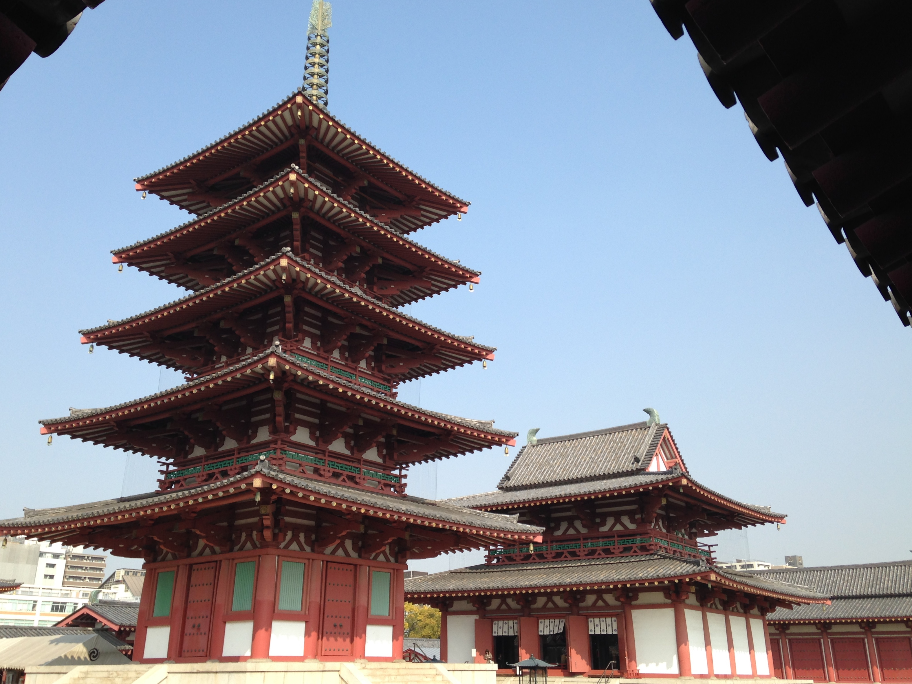 四天王寺・金堂と五重塔